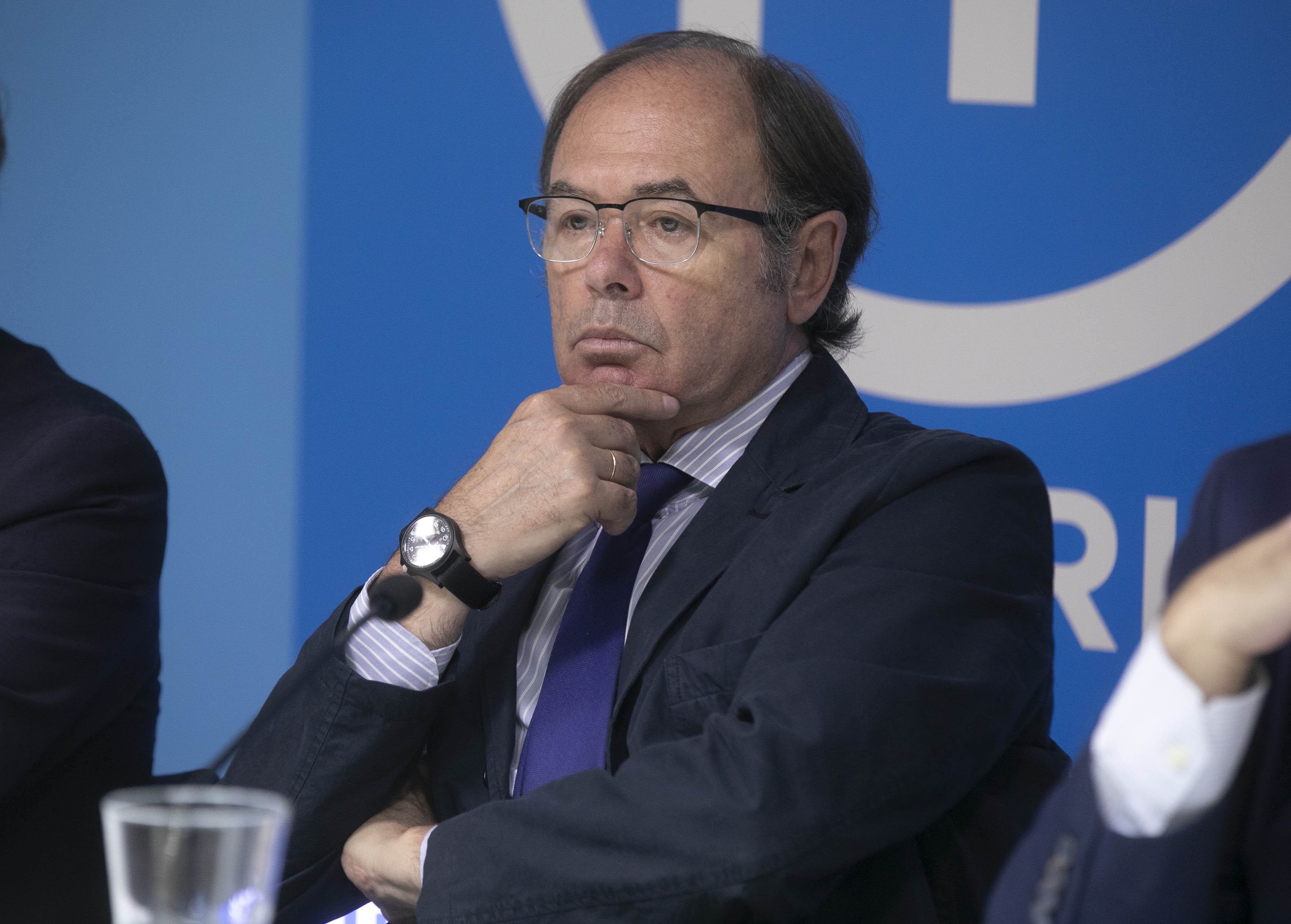 AACU4015